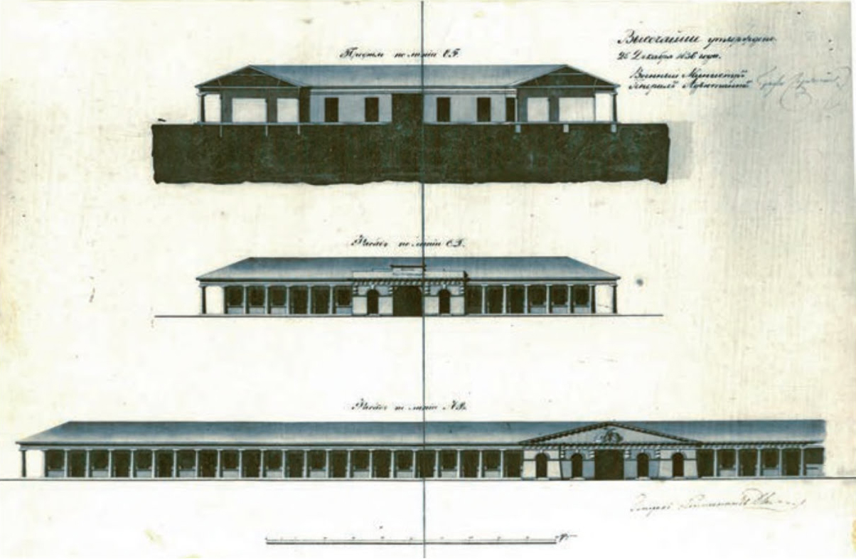 Беларуская (тарашкевіца): Берасьце (Bieraście), вуліца Шашэйная (vulica Šašejnaja). Гасьціны двор, праект